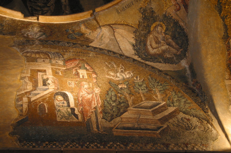 Kariye Camii, Istanbul. Mosaikk Annas bebudelse.